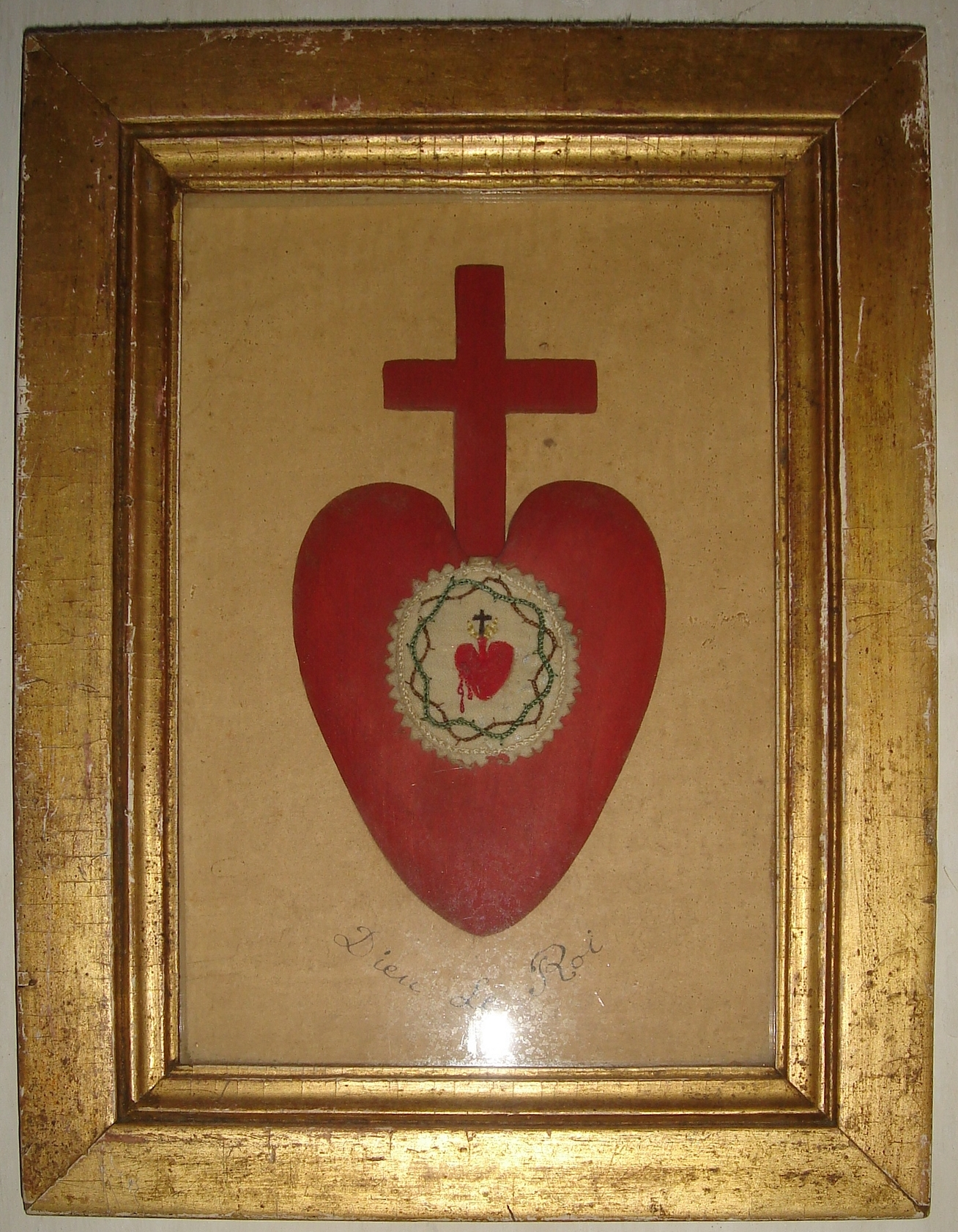 Coeur vendéen datant de la Révolution française, conservé dans un cadre. inscription : "Dieu, le roi." Surajouté: coeur en passementerie édité en 1889 pour le centenaire de la Révolution.